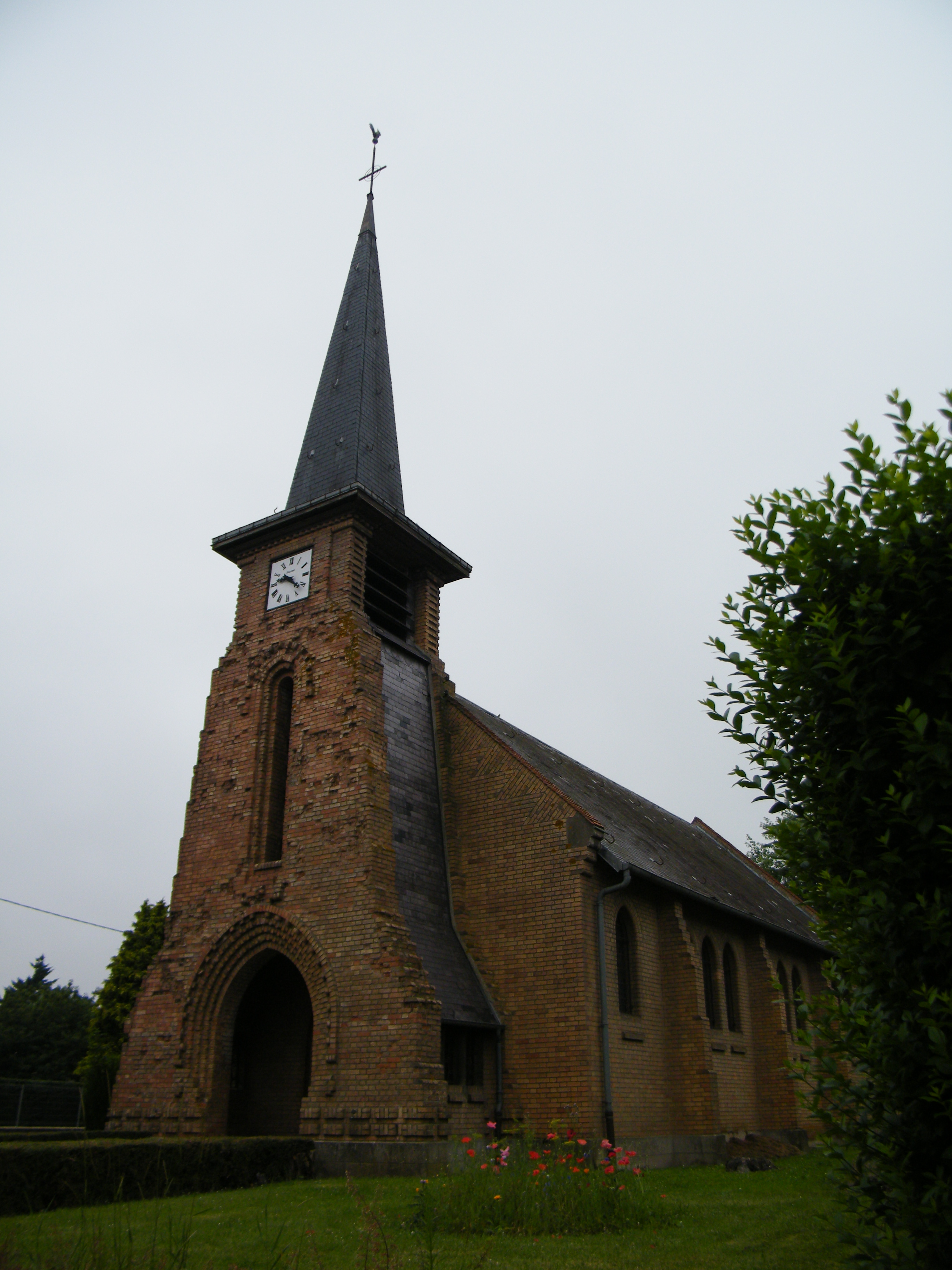 Église Saint-Thomas (Warfusée).